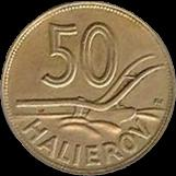 50 Slovak halier (1941) - reverse